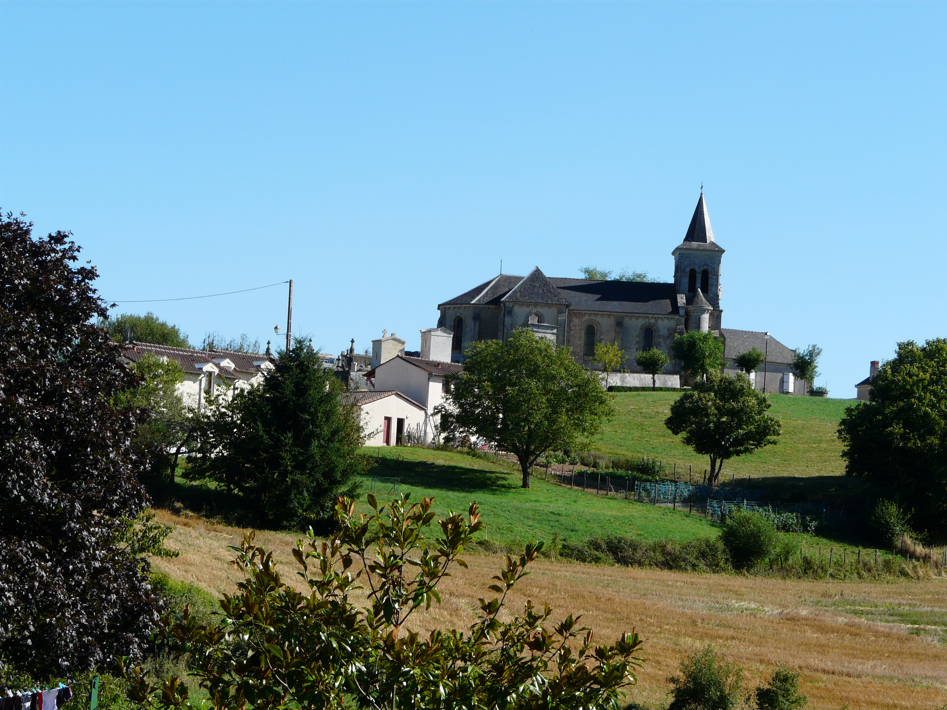 Le village de Châtres, Dordogne, France.